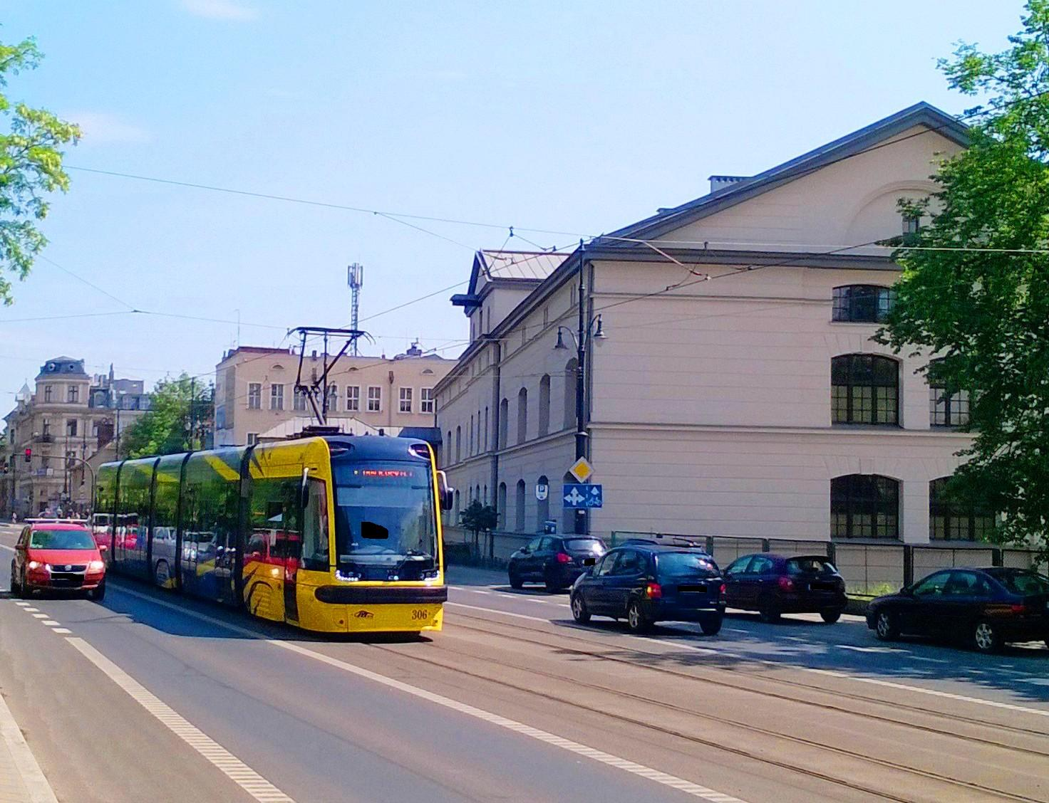 Ulica Szumana w Toruniu